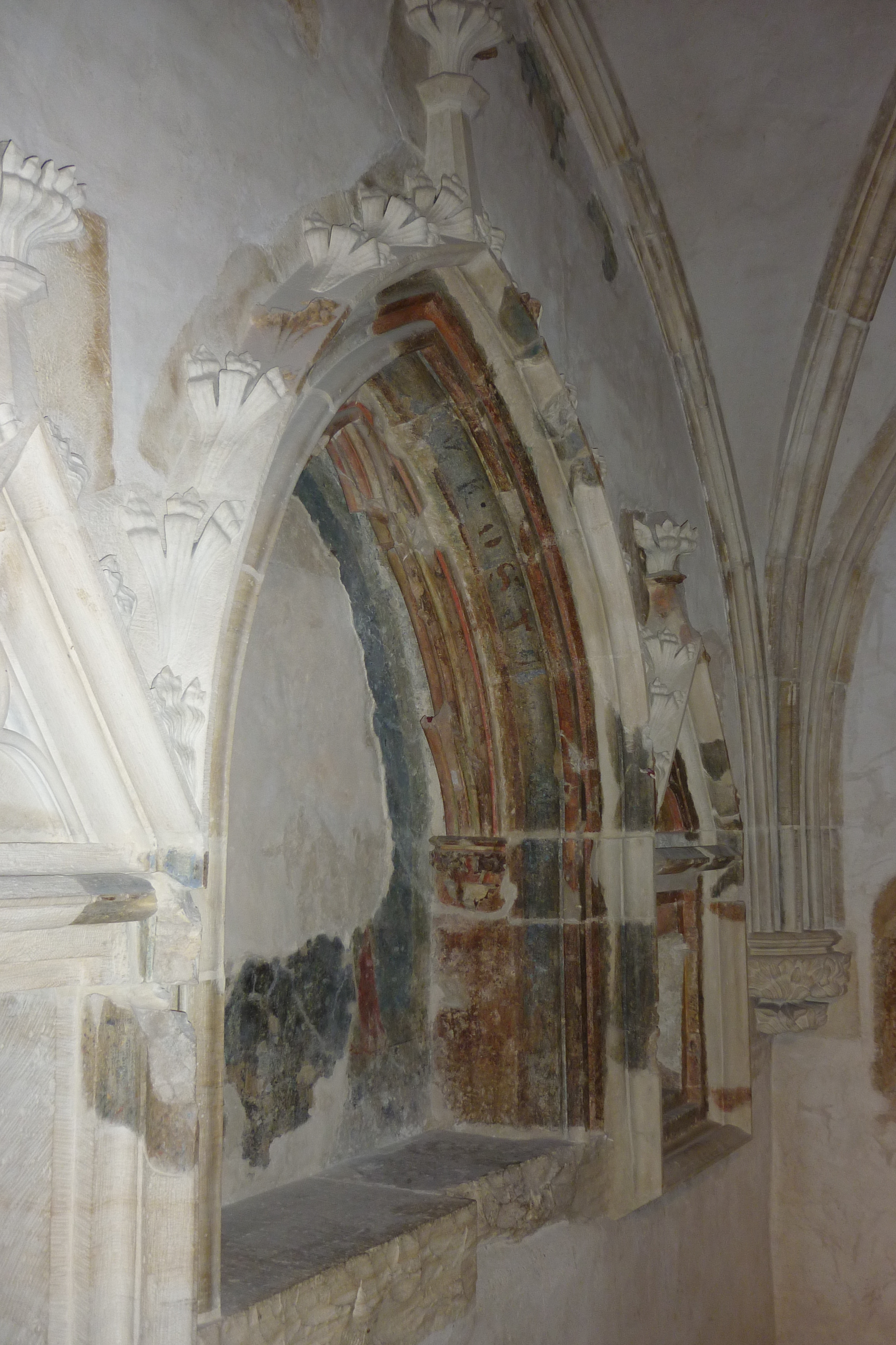 Ukázka polychromie ve výklenku v soukromé oratoři domu U Kamenného zvonu